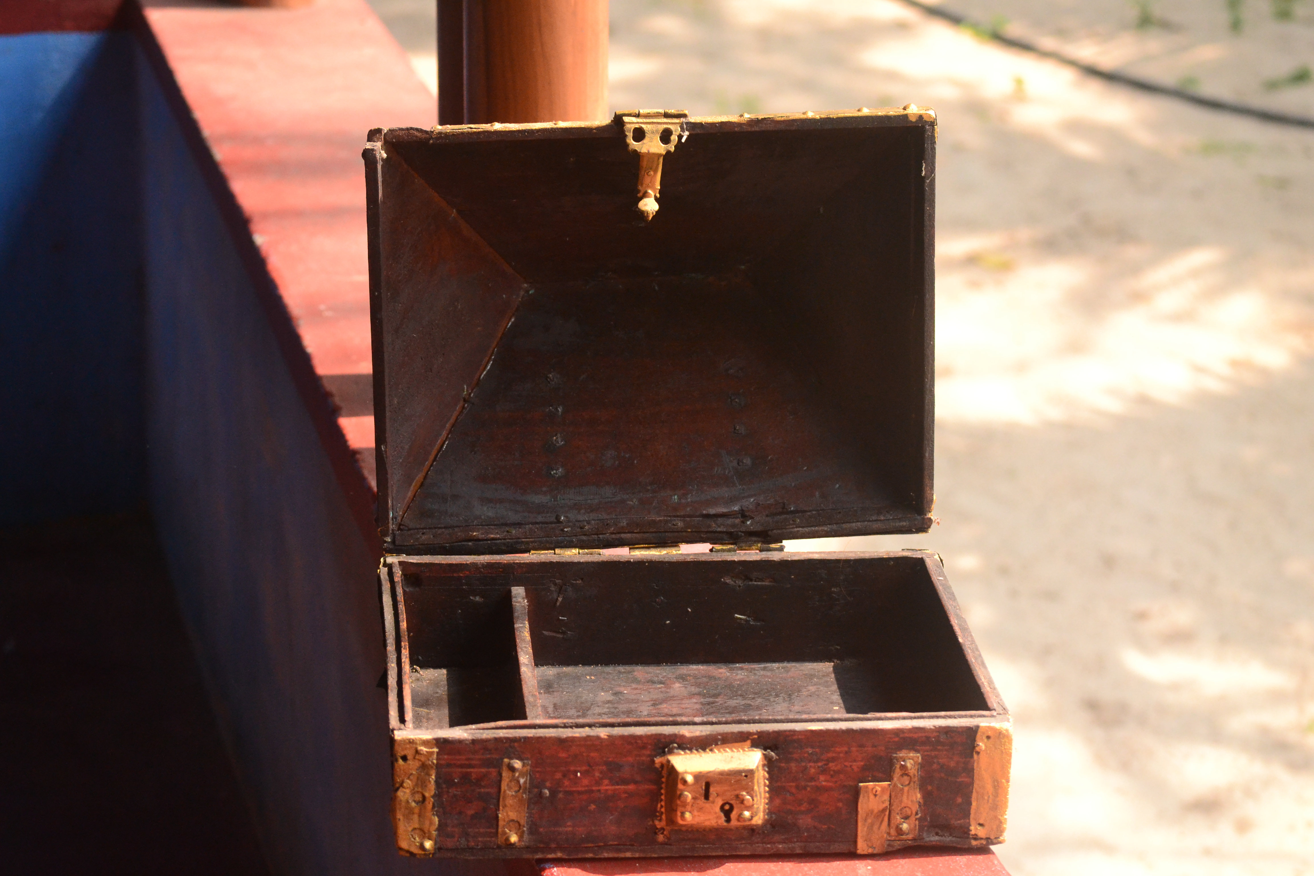 ചെല്ലപ്പെട്ടി